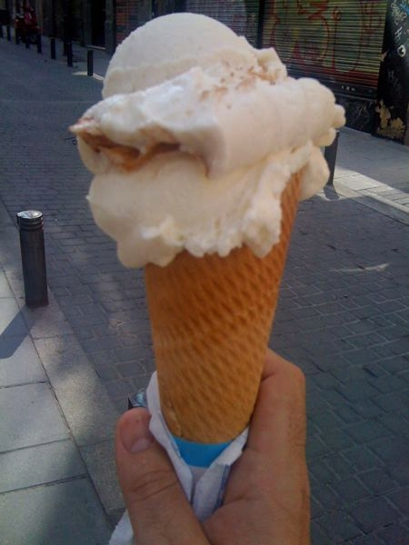 Un cucurucho con una bola de helado de leche merengada.